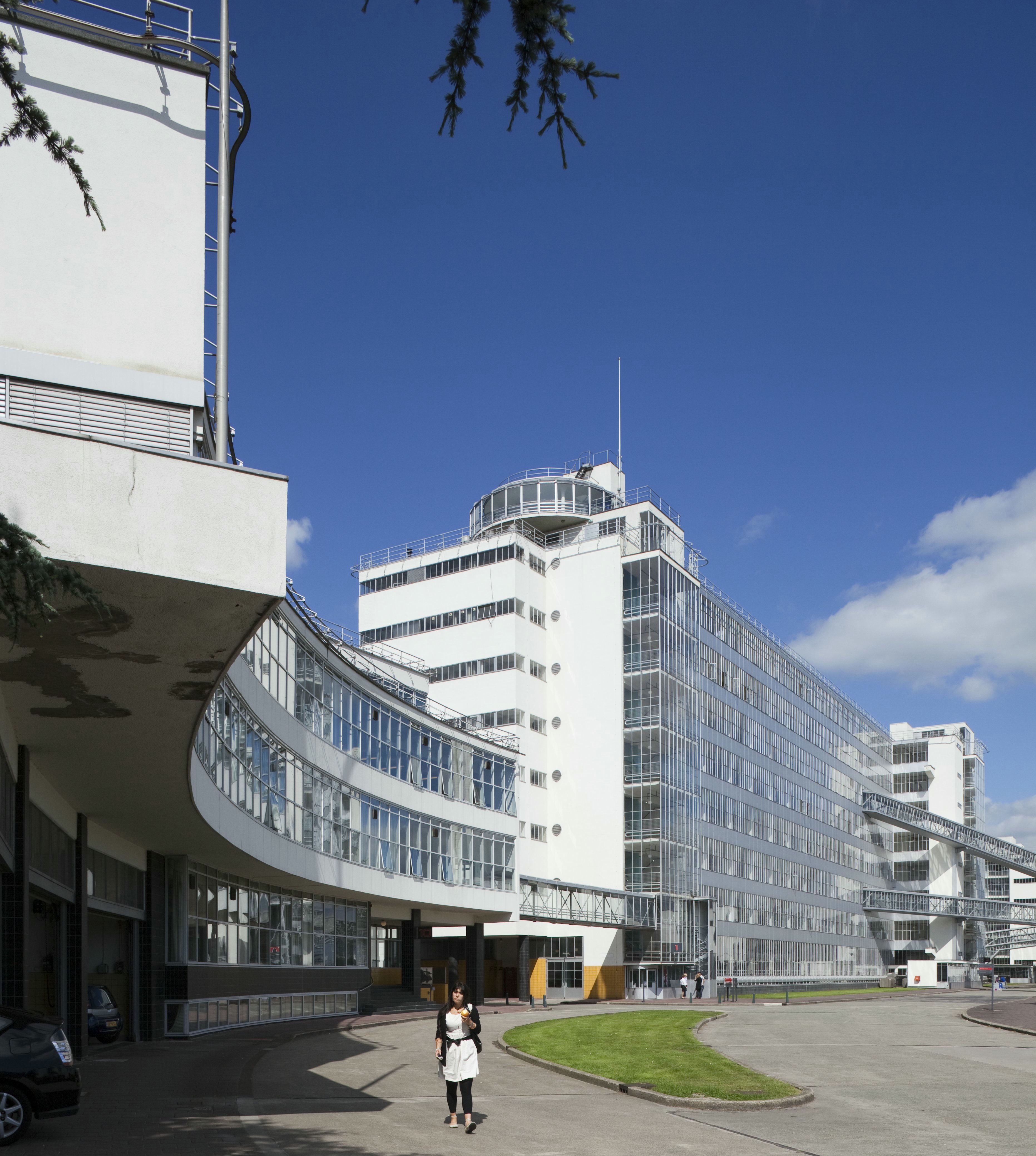 (voormalige) Van Nellefabriek, - Fabriekscomplex: Overzicht voorgevel van de fabriek: kantoorgebouw en tabaksfabriek